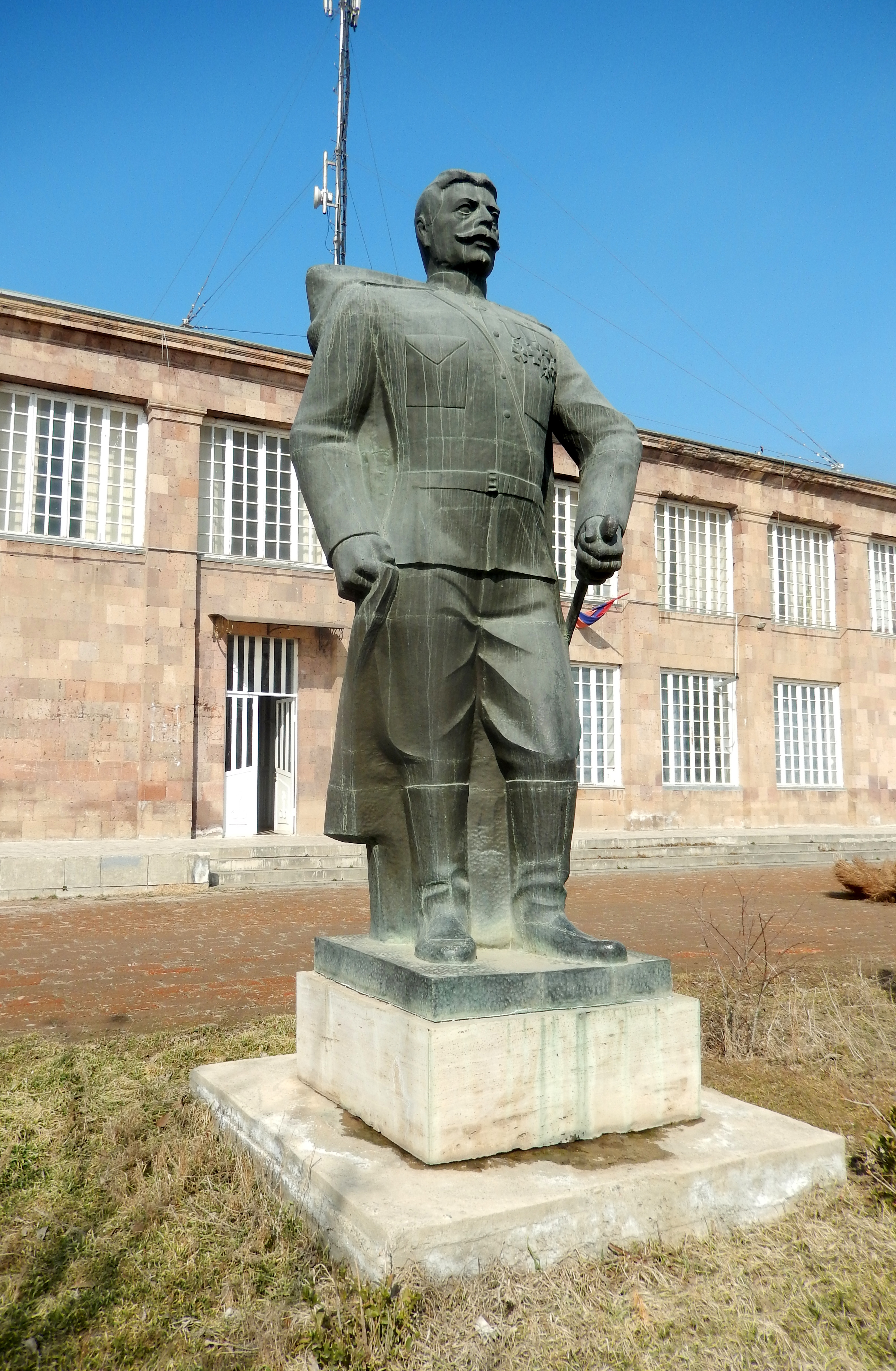 Զորավար Անդրանիկի հուշարձանը Այգեպատում, Արարատի մարզ